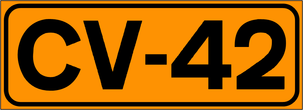 Inidcador de la Carretera de la Comunidad Valenciana CV-42